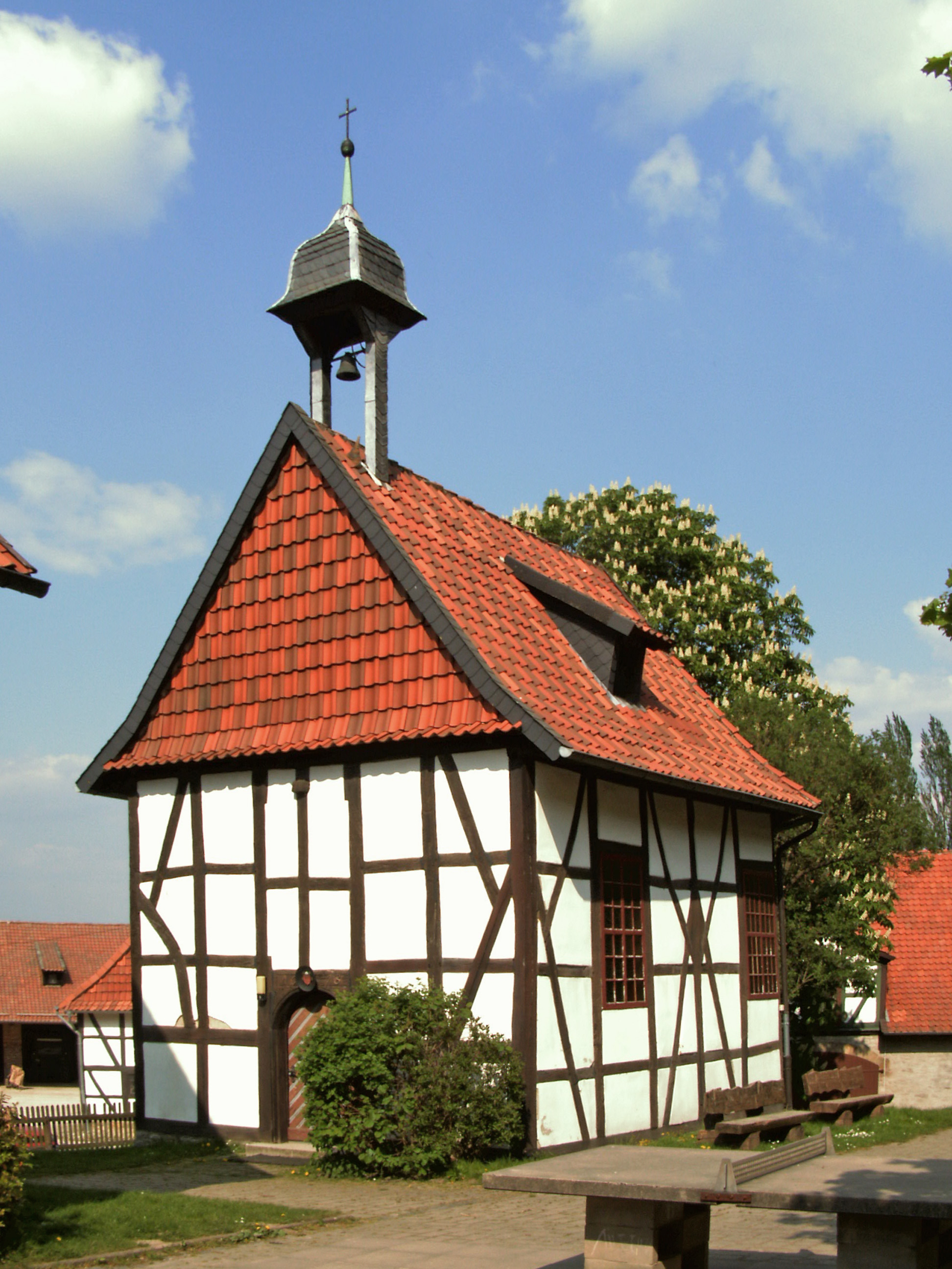 Katholische St.-Antonius-Kapelle auf dem Gelände der Benediktinischen Gemeinschaft St. Romuald, im Ortsteil Röderhof von der Ortschaft Egenstedt, Gemeinde Diekholzen.